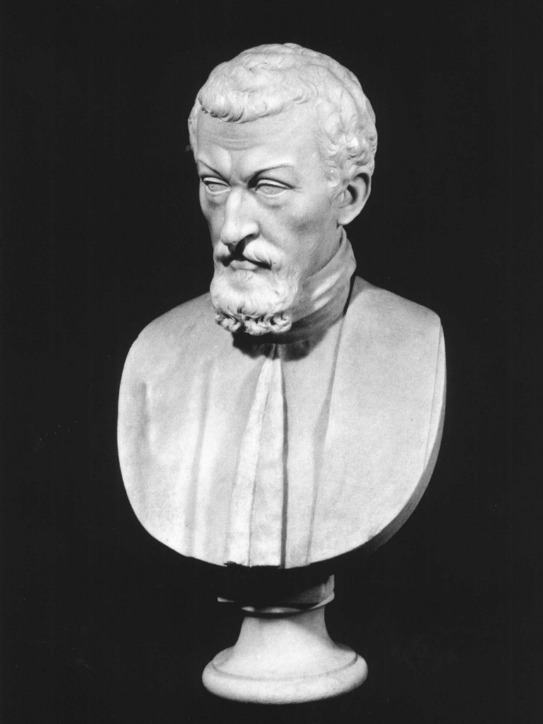 Busto di Paolo Paruta, opera di Luigi Ferrari precedente al 1847. Il busto fa parte del Panteon Veneto, conservato presso Palazzo Loredan di Campo Santo Stefano a Venezia.